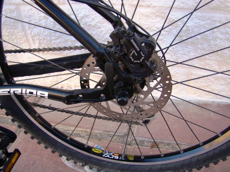 mtb merida